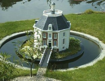 Maquette van Kasteel Drakestein in Madurodam. Gedeelte van zelfgemaakte foto.